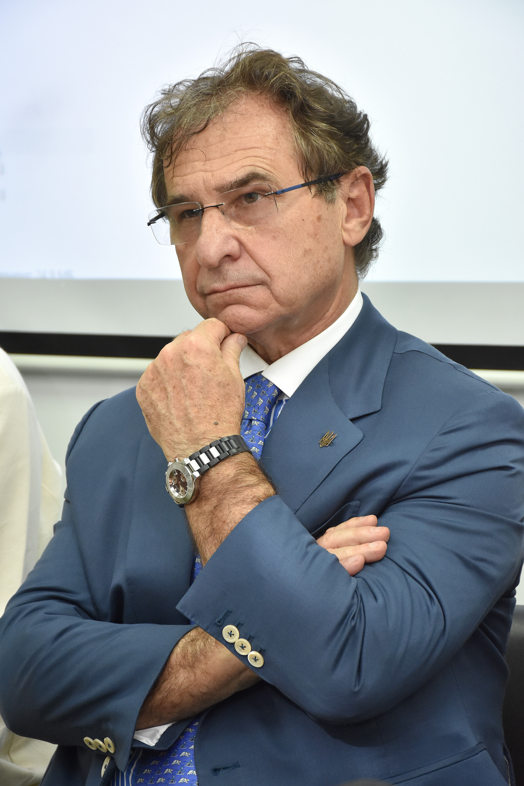 Аргентинський нейрохірург-новатор українського походження, засновник і директор Інституту внутрішньосудинної хірургії та інтервенційної радіології «ENERI» м. Буенос-Айрес Петро Лилик.